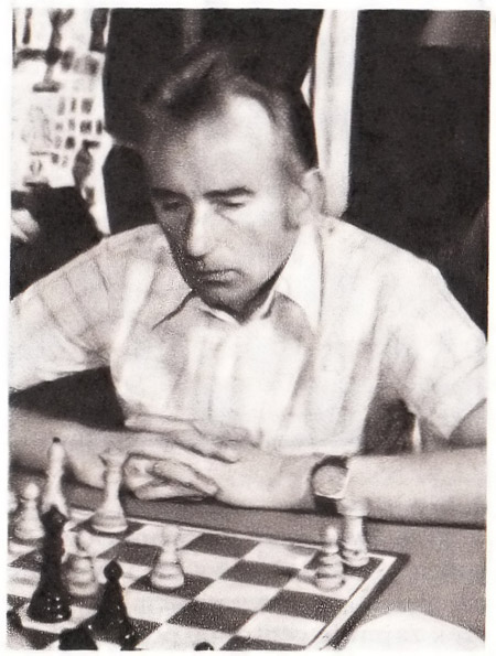 Zbigniew Doda (ur. 22 lutego 1931 w Poznaniu) – polski szachista, mistrz międzynarodowy.